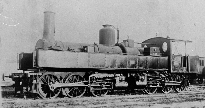 Locomotive "Hérault" 030+030T Meyer n° M-151 à Montpellier-Chaptal, en version modifiée.